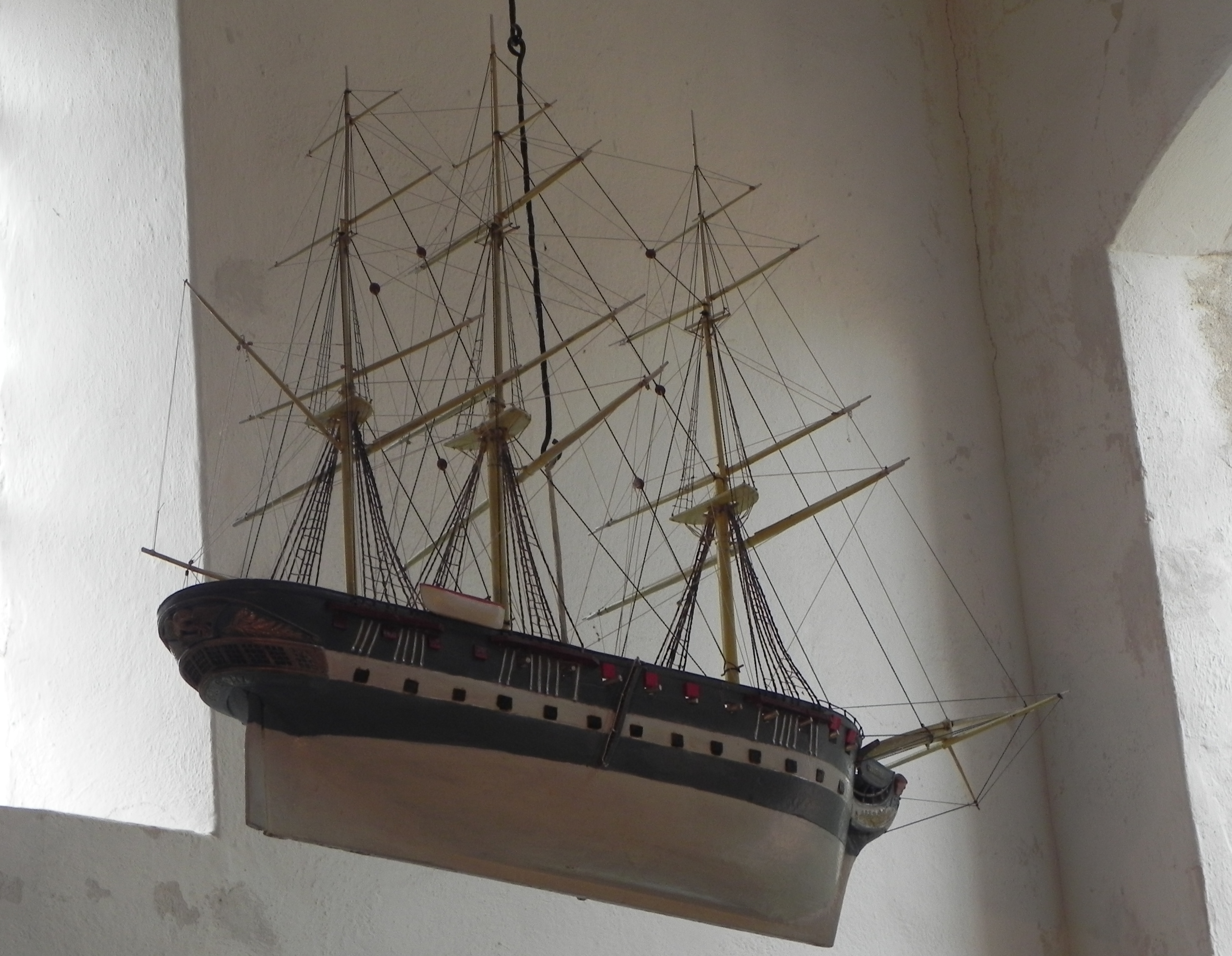 Votivschiff „Peter Kraft“ in der Seemannskirche in Prerow (Darß)(Modell einer Dreimast-Fregatte)